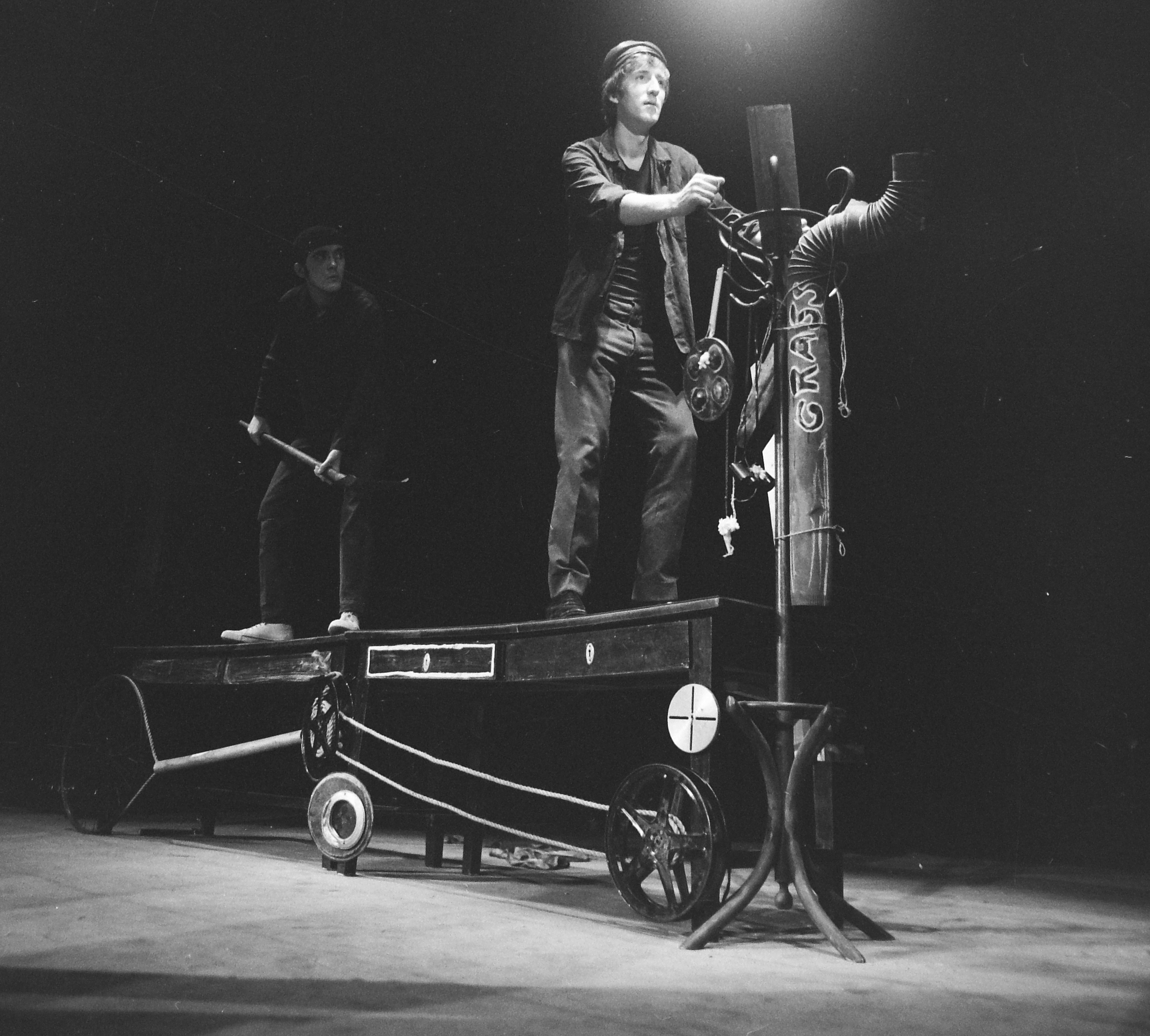 Camus: Lázadás Asturiában (Universitas). Jobbra Helyey László színművész. Location: Hungary, Budapest V. Tags: art of theater, celebrity, actor, theater performance, Budapest Title: Camus: Lázadás Asturiában (Universitas). Jobbra Helyey László színművész.